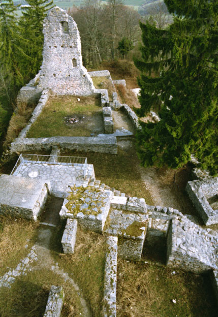 Uebersicht ueber die Anlage der Farnsburg von der Schildmauer aus